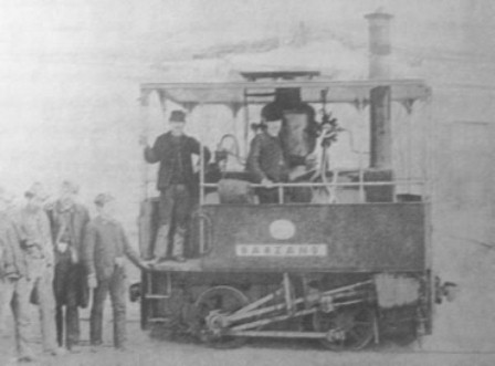 Locomotiva Barzanò